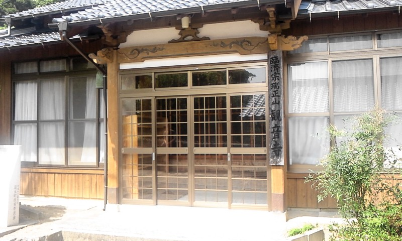 対馬市 観音寺外観